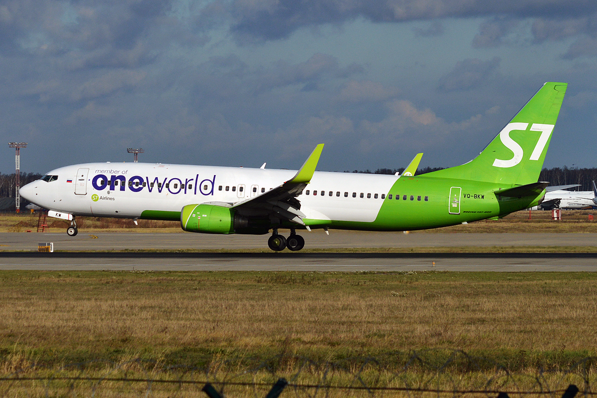 S7 Airlines, VQ-BKW, Boeing 737-8ZS